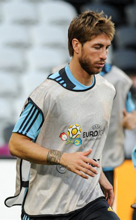 Серхио Рамос